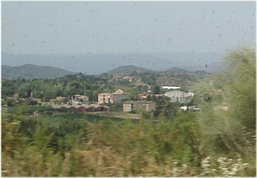 Vista de Falset des dels seus afores (Priorat - Catalunya)